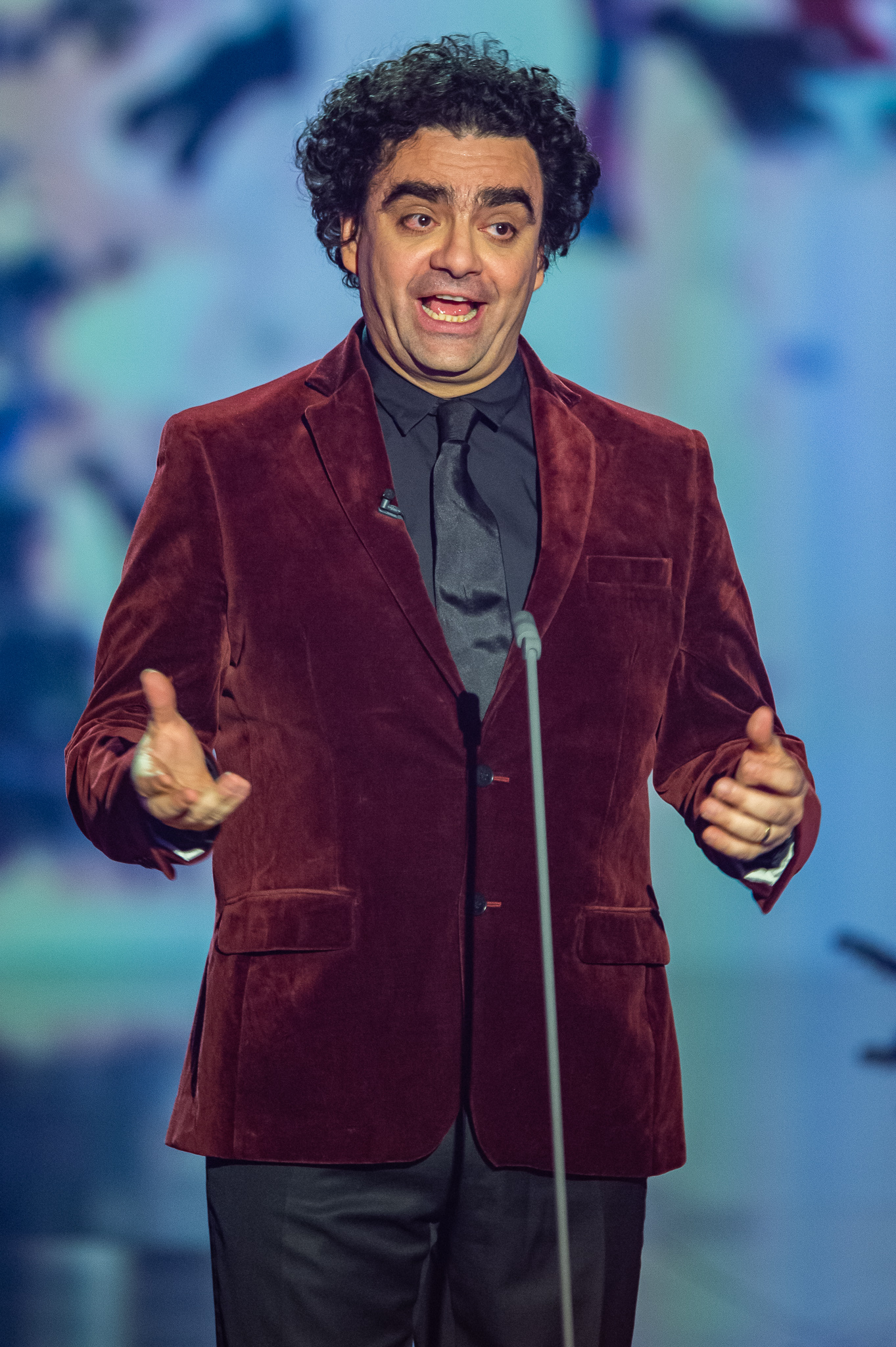 BR,Bayerisches Fernsehen,Frankenhalle,Live-Sendung,Rolando Villazón,Sternstunden-Gala,Sternstundengala